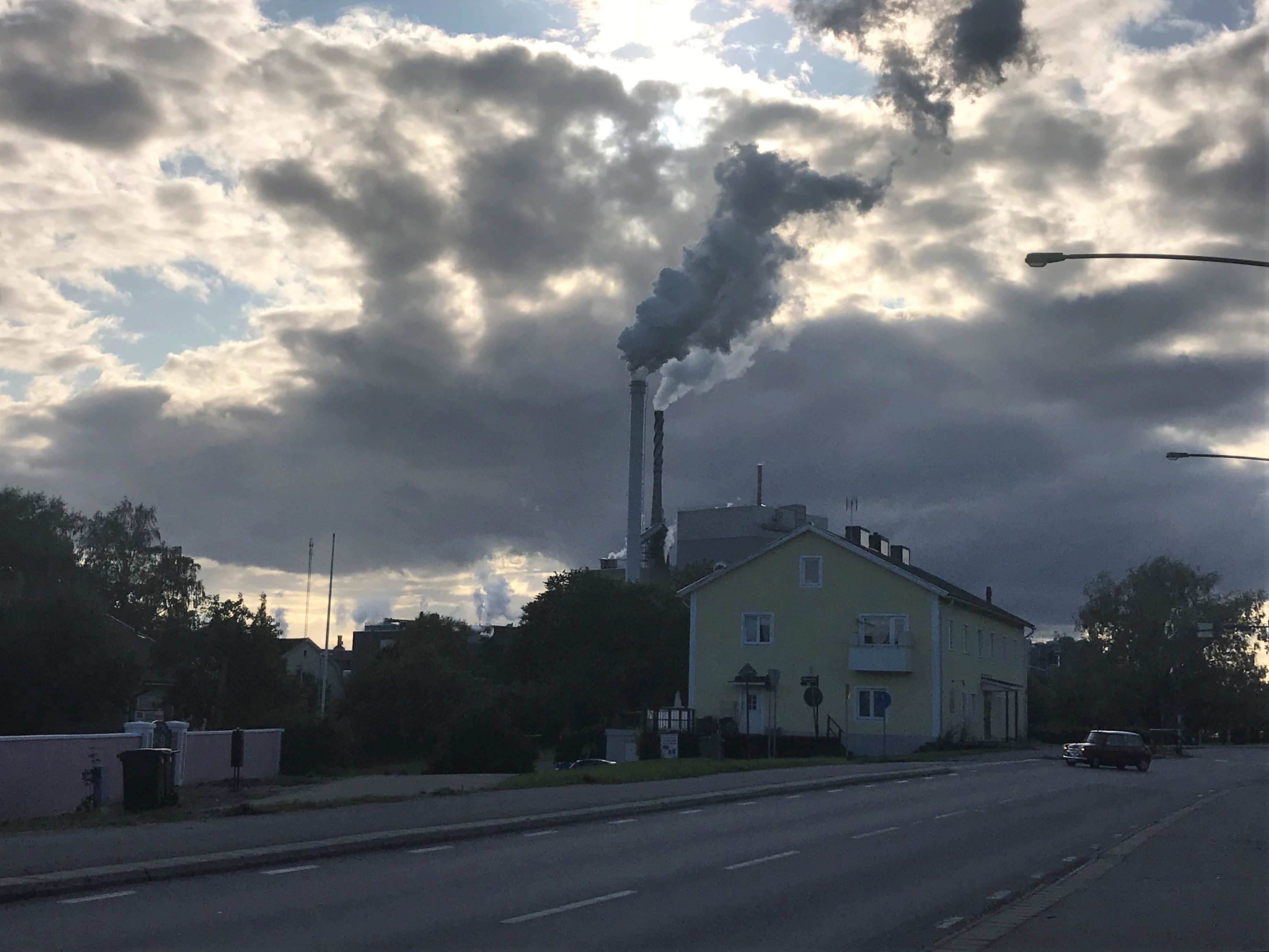 Skärblacka